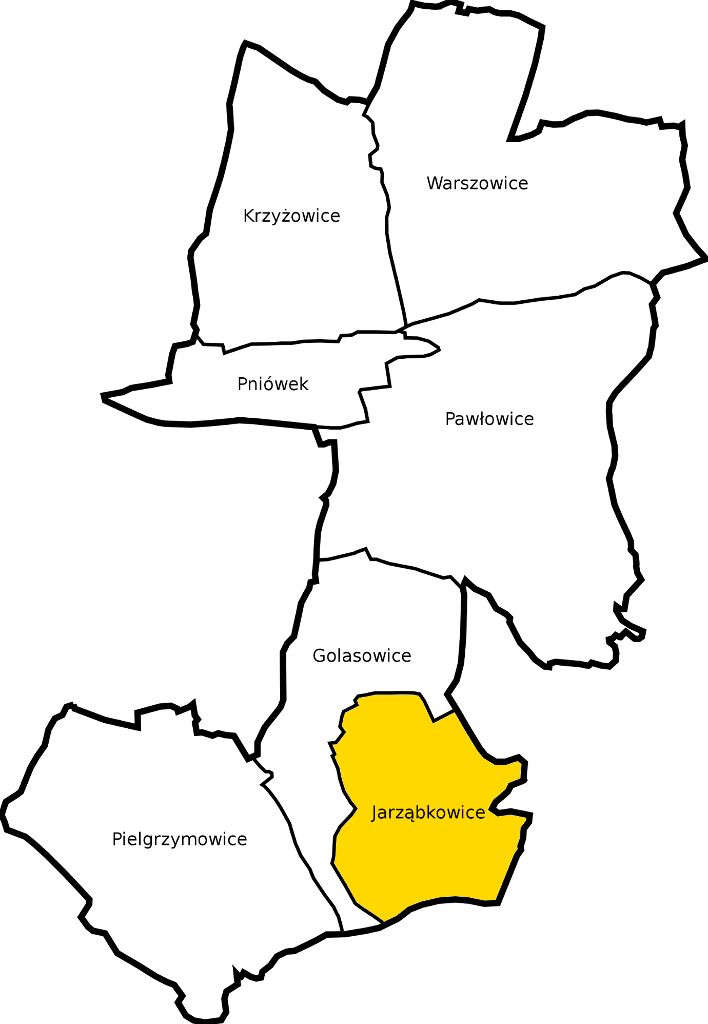 Sołectwo Jarząbkowice na mapie gminy Pawłowice